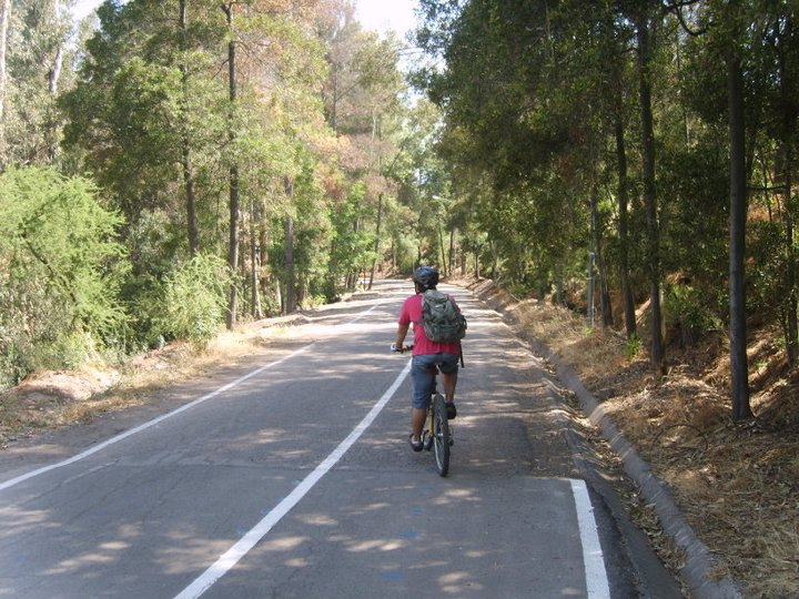 Ciclovía Parque Metropolitano de Santiago, Chile